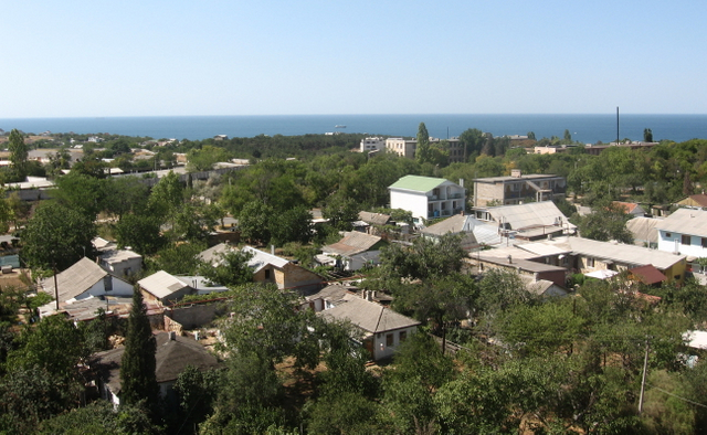 Barteniyevka neighbourhood in Sevastopol